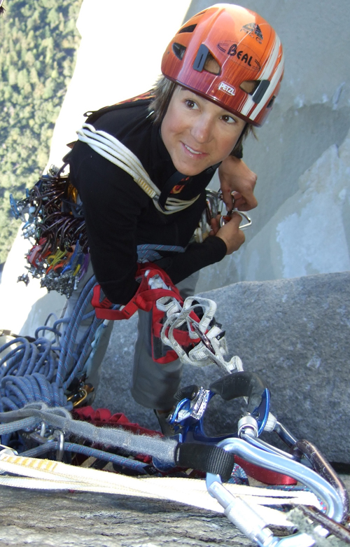 Relais suspendu au Nose, El Capitan, YOSEMITE